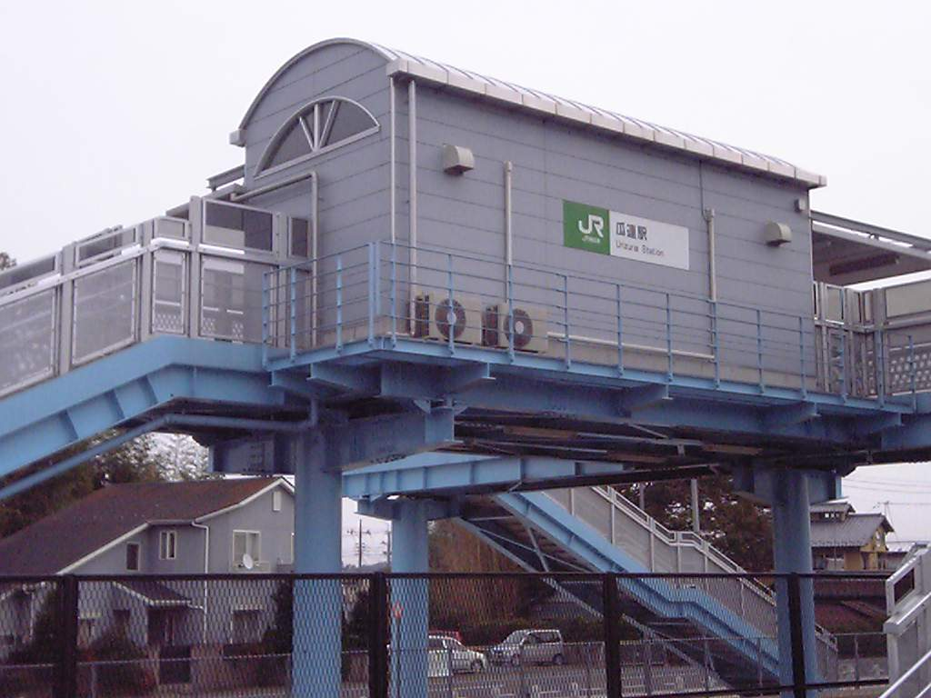 瓜連駅（2009/10/24撮影）